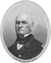 Hiram Paulding